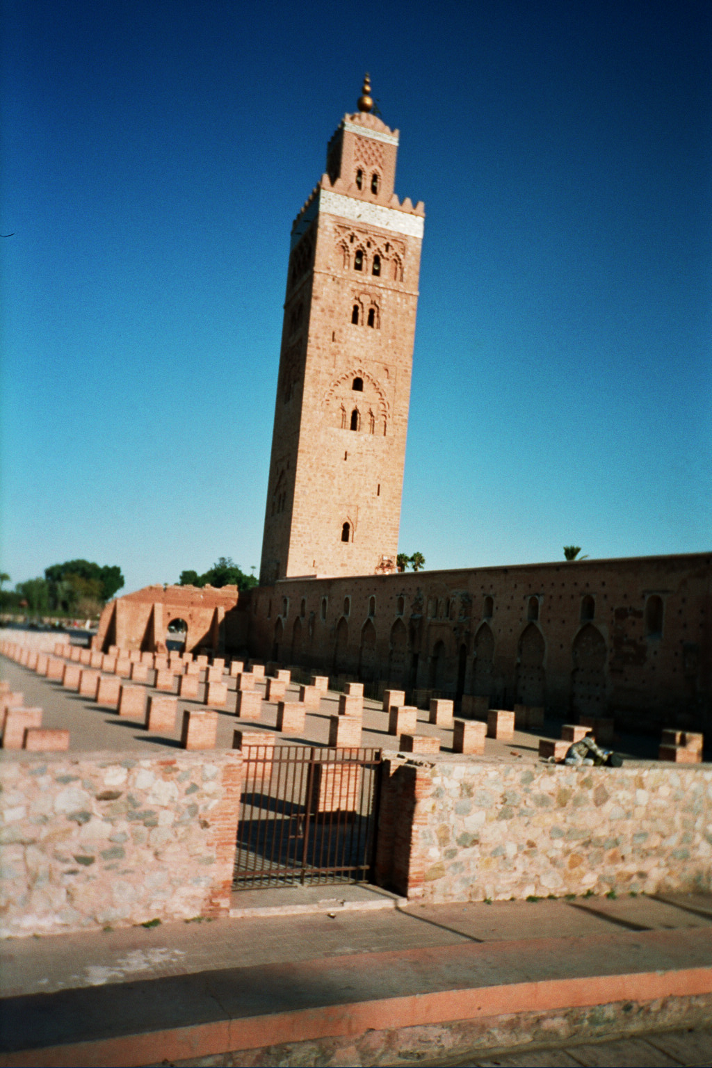 Foto på Koutobia, moské i Marrakech, Marocko, tagen av mig själv.